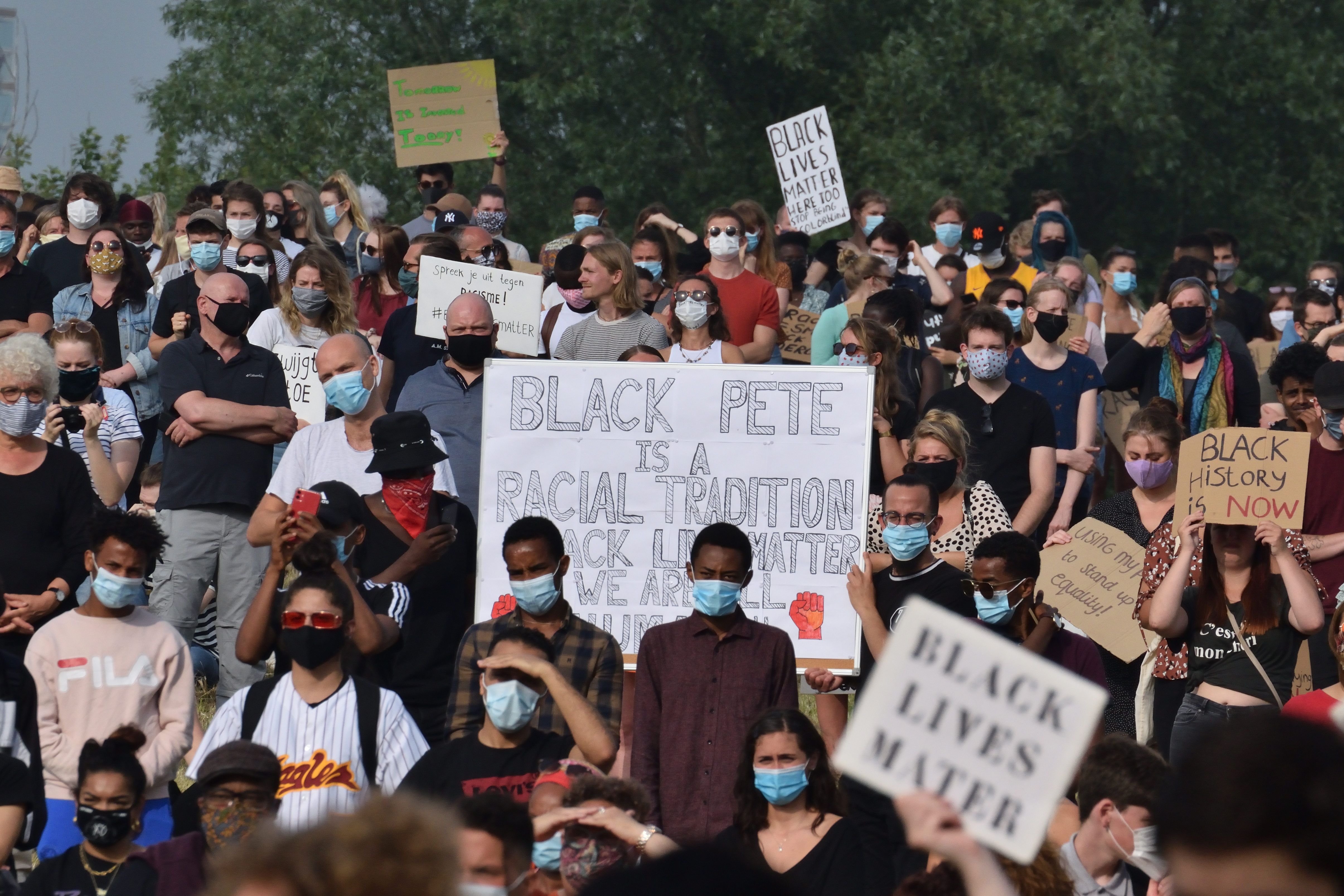 Demonstration 13 June 2020 Rengerspark Leeuwarden Black lives matter / Black Pete